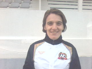 Peggy Provost après le match Juvisy-Le Mans U19 du 02 mars 2014